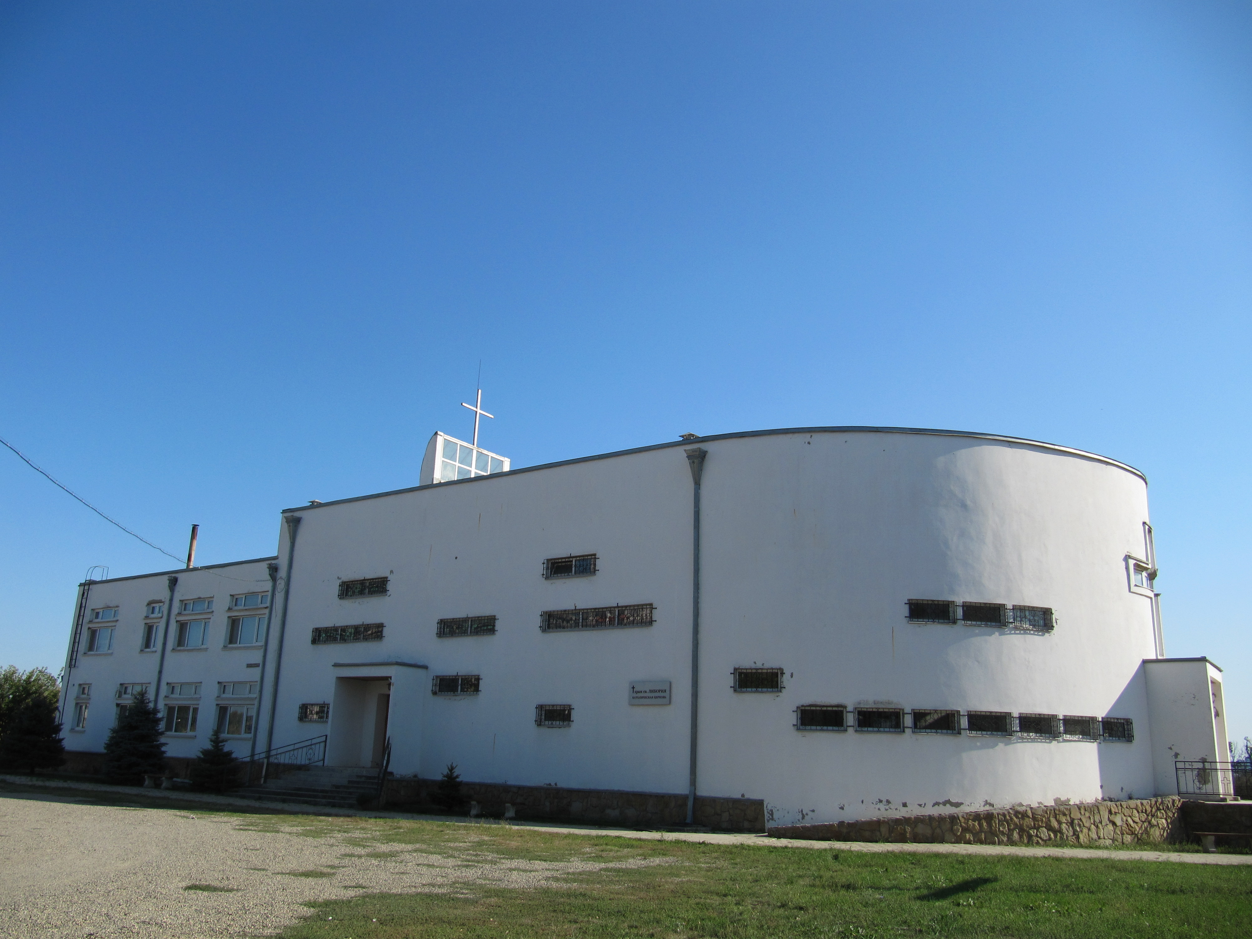 Католическая церковь святого Либория в Краснодаре